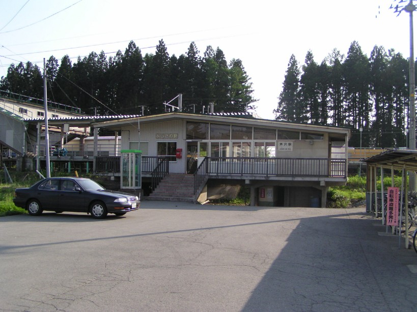 Ashisawa Station, Obanazawa, Yamagata, Japan